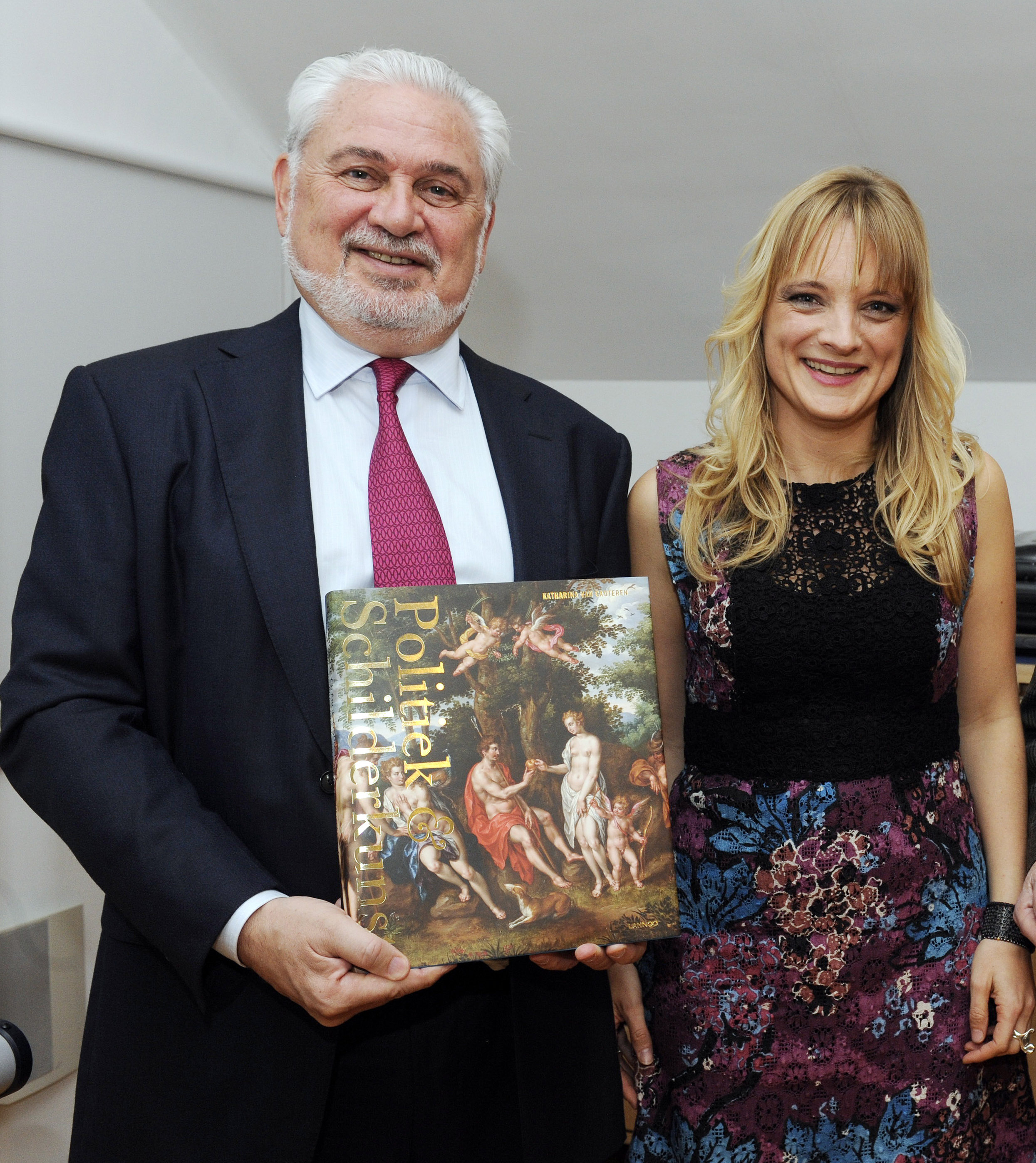 Persconferentie en boekpresentatie van het boek Politiek & Schilderkunst in de Ridderzaal in de Van Aerdtstraat op 2 februari 2016